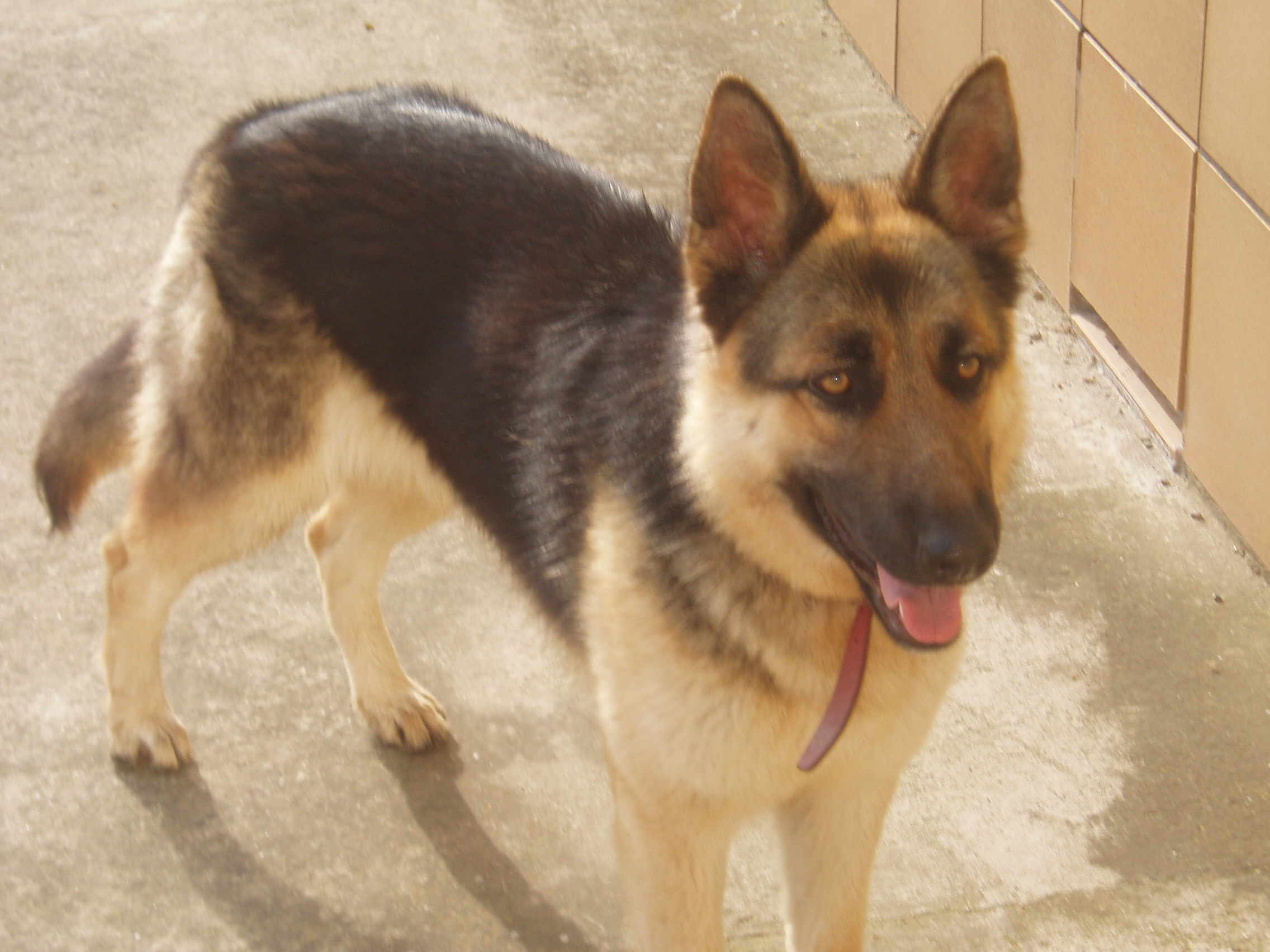 Fotografia d'una femella de pastor alemany a l'edat de dos anys.